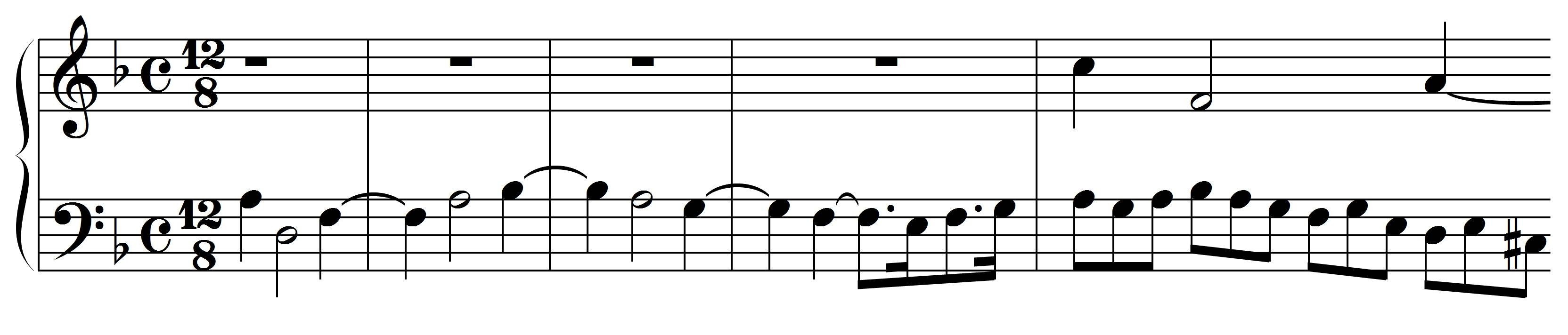 Bach, JS, Incipit Contrapunctus 16, BWV 1080